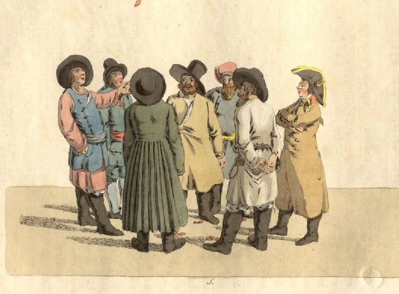 Орел или решка